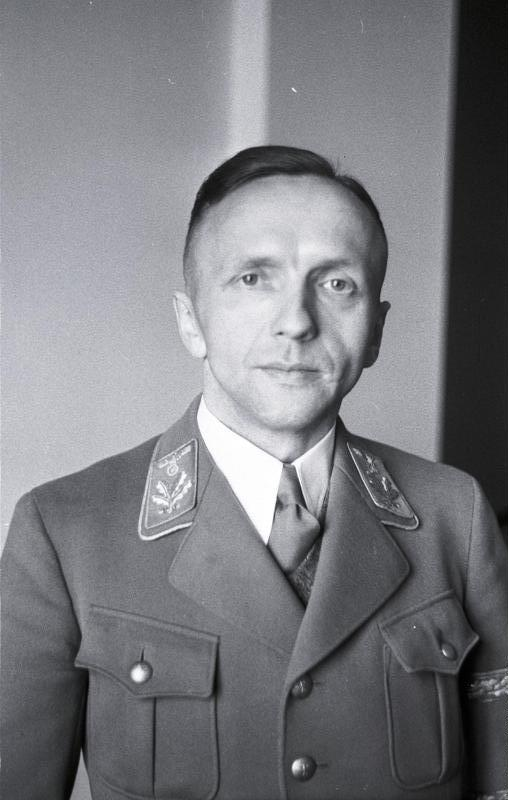 Ernennung Gerhard Klopfers zum Staatssekretär in der Parteizentrale des Führers.